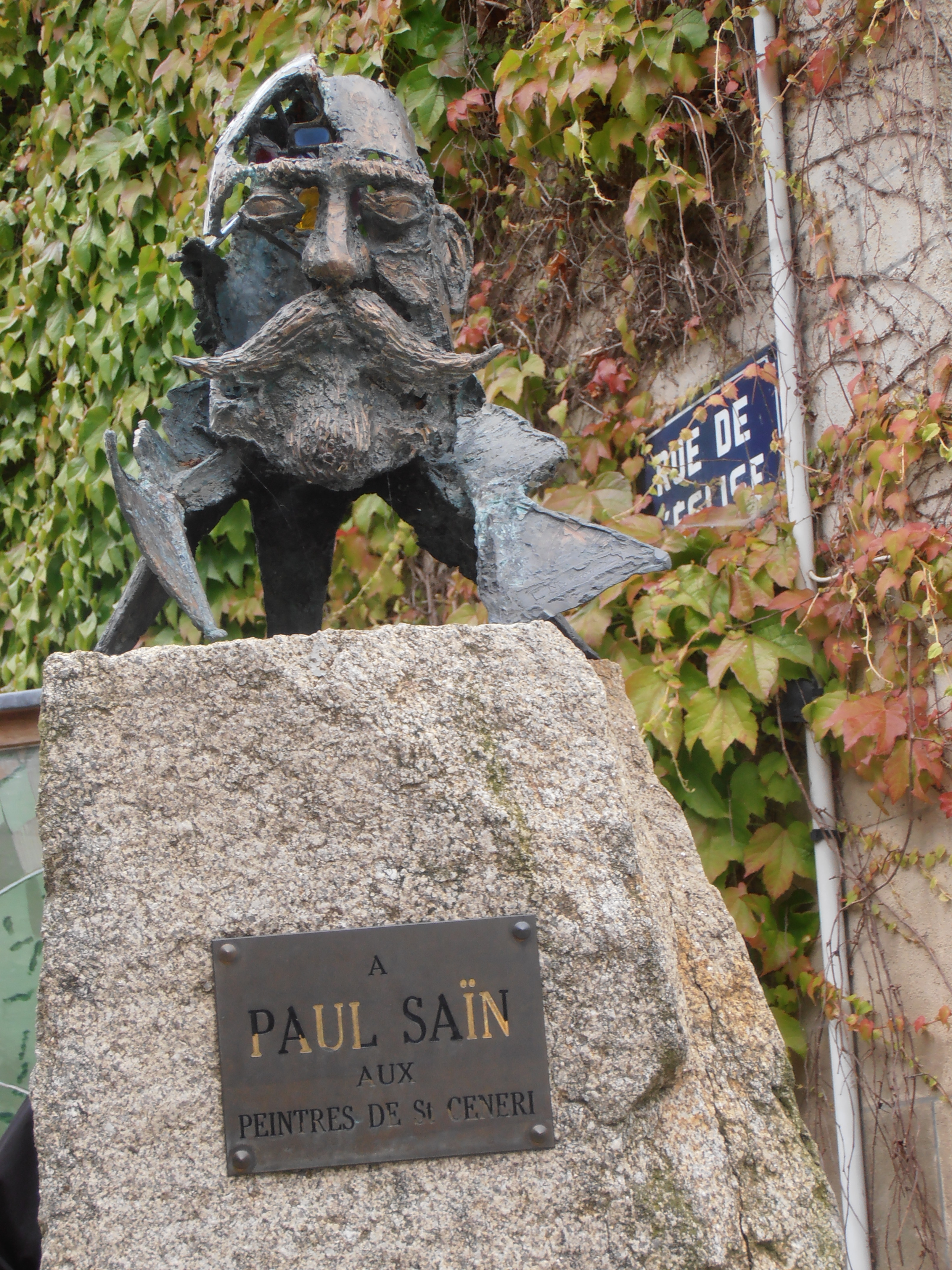 Orne, Saint-Céneri-le-Gérei, A Paul Saïn, aux peintres de St Céneri